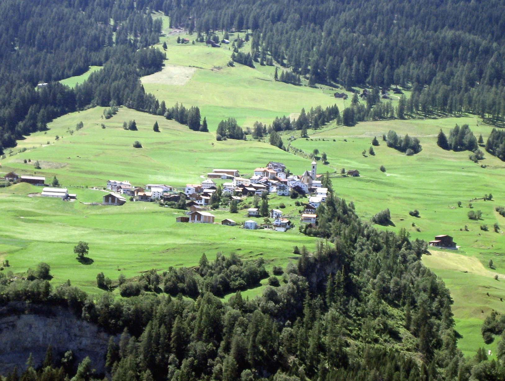 Stierva